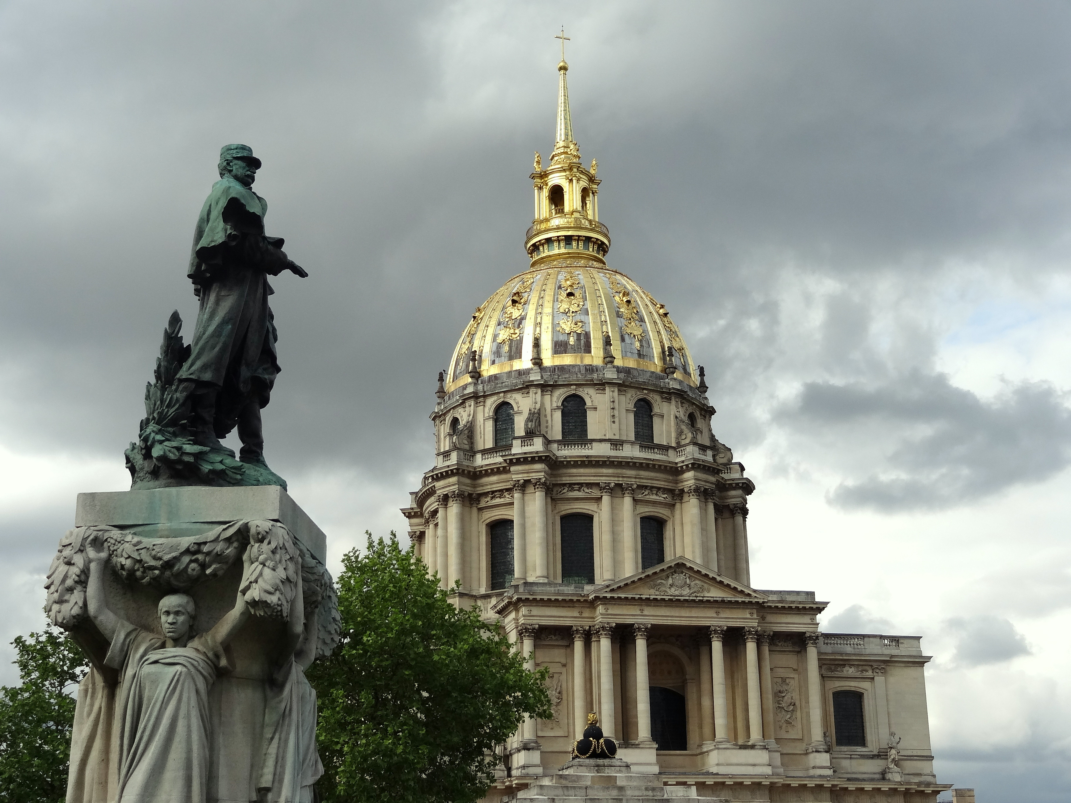 Place Vauban, 7e arrondissement de Paris : la statue du maréchal Gallieni face à l'église du dôme des Invalides.